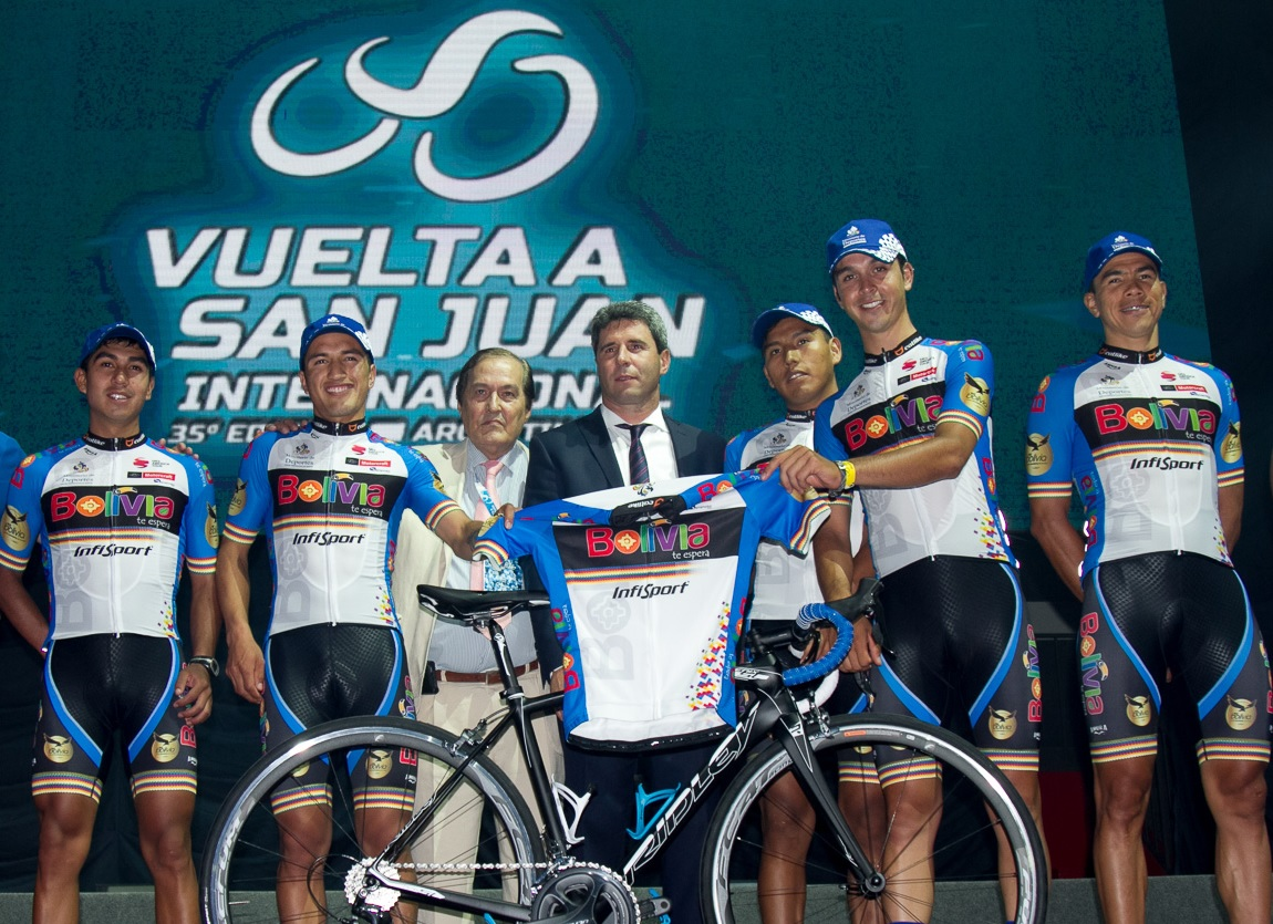 Vuelta a San Juan 2017 - Equipo Bolivia (Bolivia) Depicted team: Bolivia